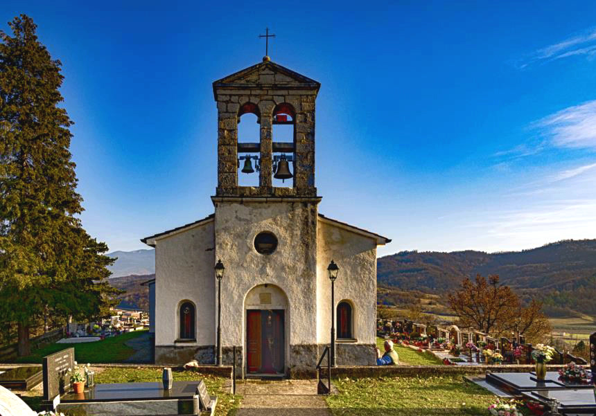 Na mjesnom groblju crkvica Sv. Duha